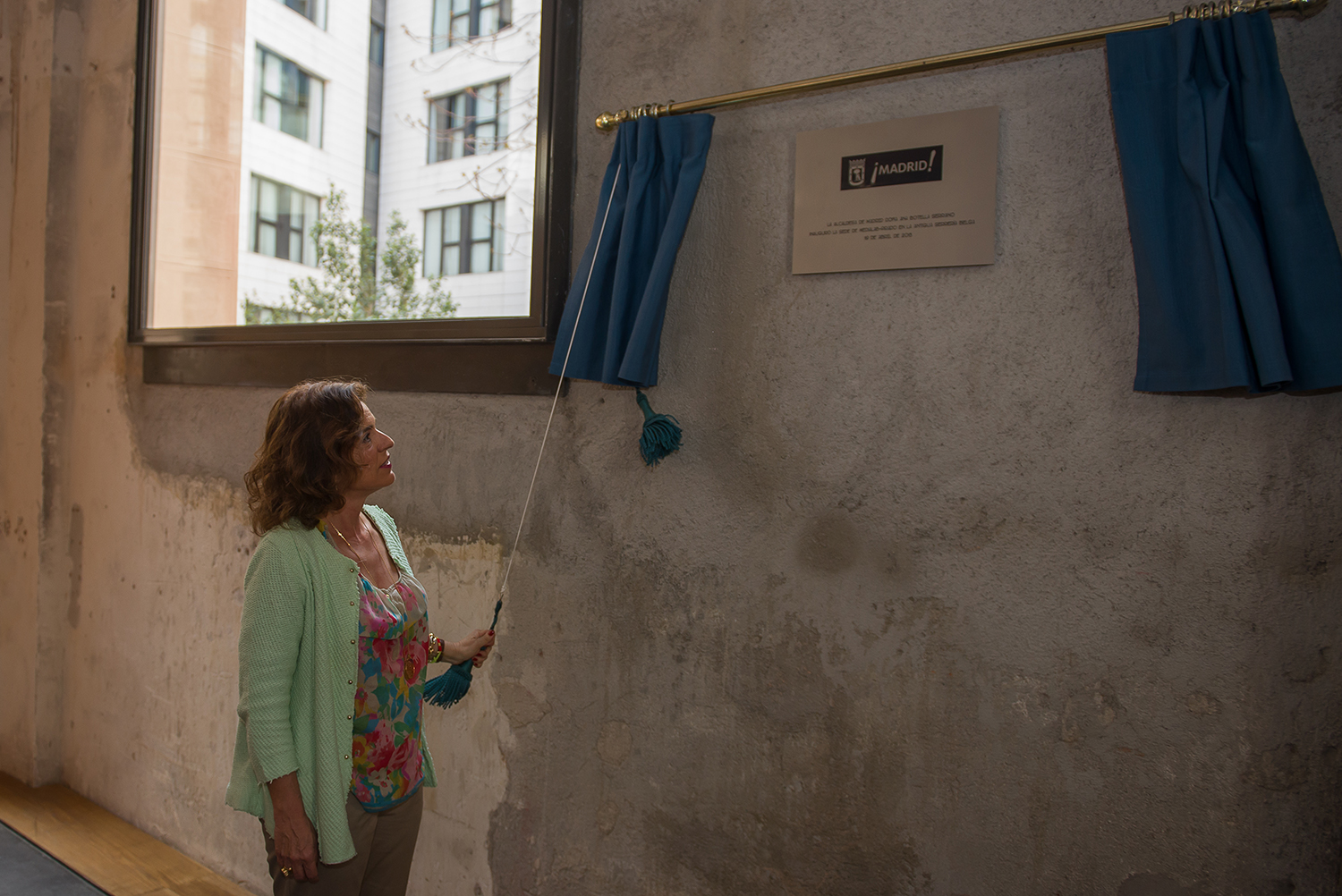 Inauguracion medialabs-prado